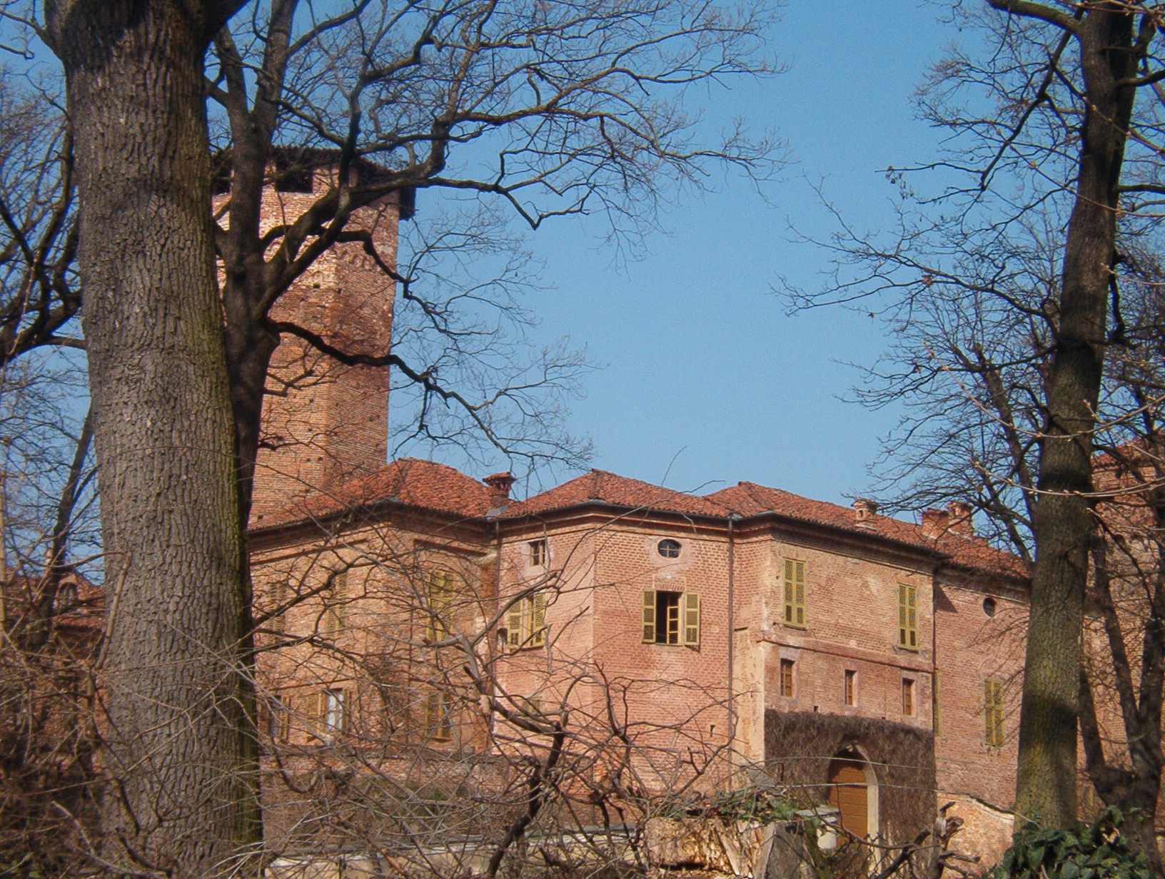 Castello Sommariva del Bosco - Provincia di Cuneo - Piemonte - Italia